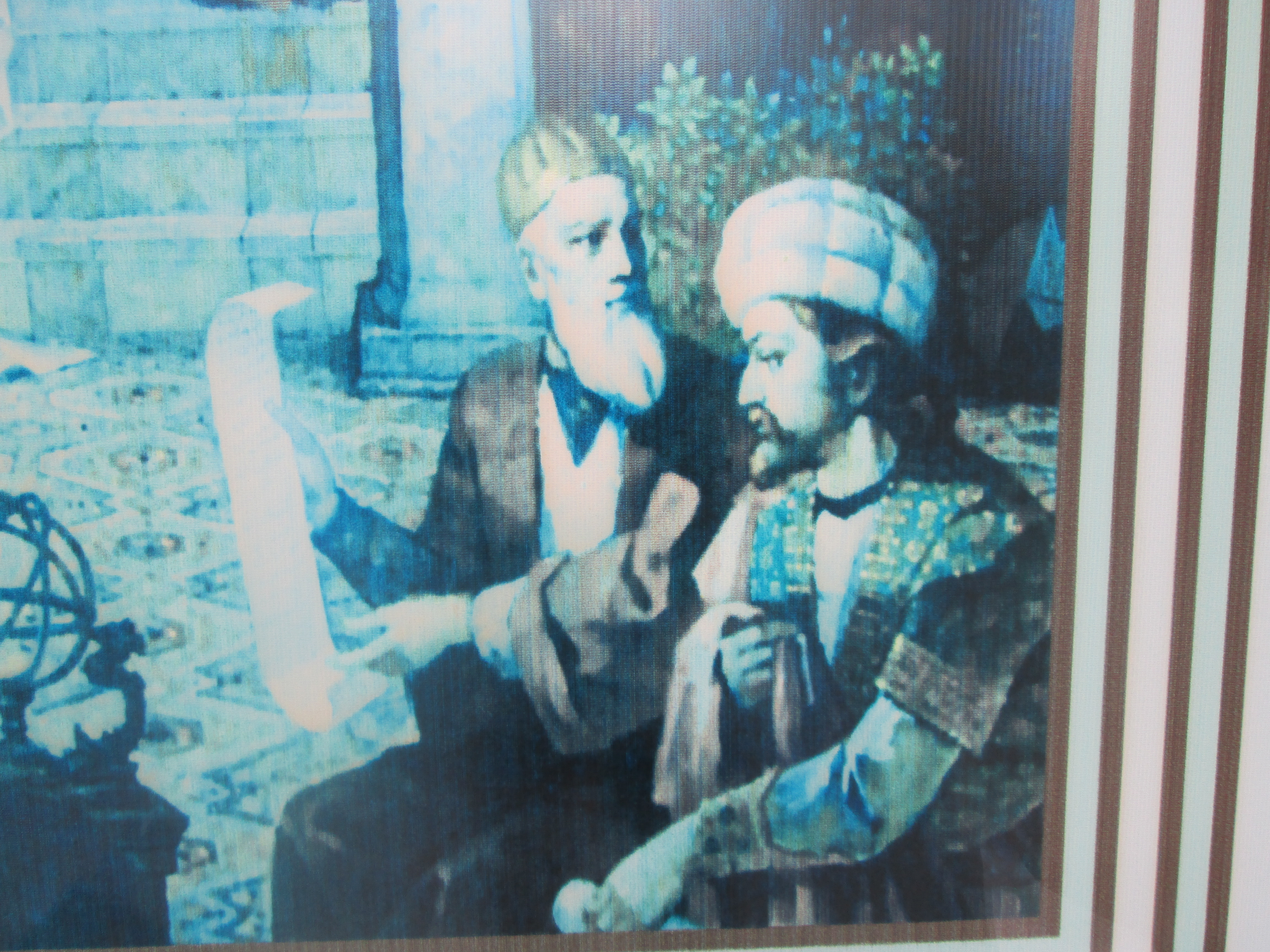 Azərbaycan şairləri